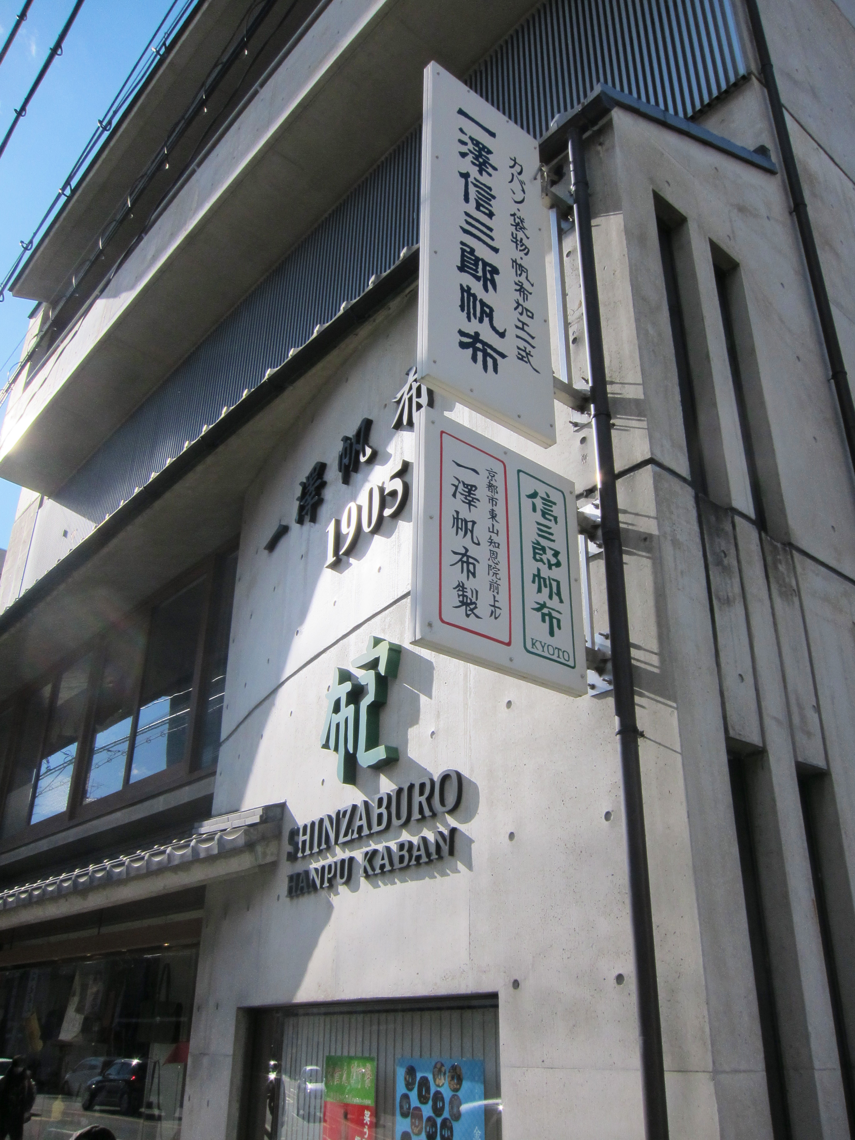 一澤帆布工業店舗